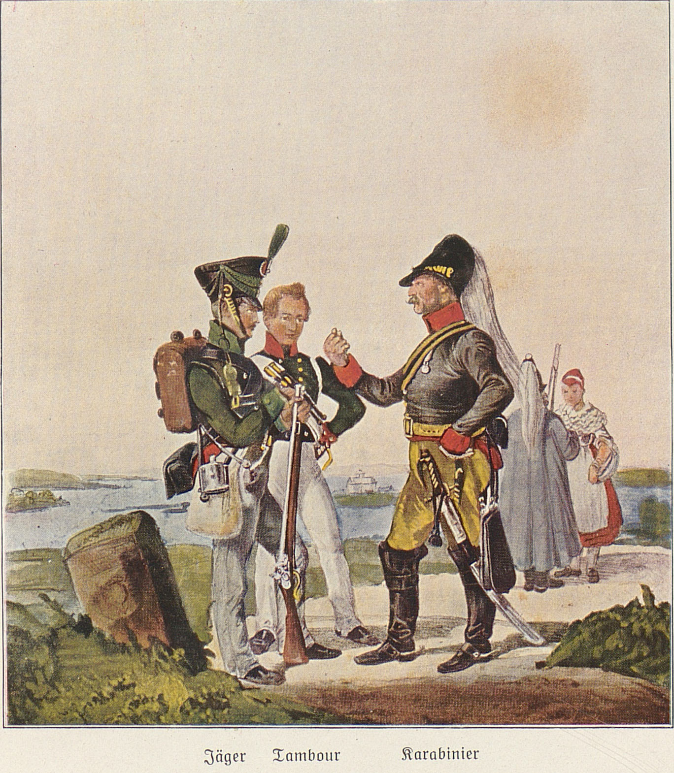 Schaumburg-Lippisches Militär um 1815